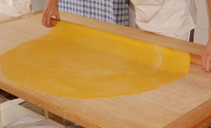 Sfoglia tirata con il mattarello. Foto realizzata dal Comune di Bologna in occasione del Premio Internazionale Sfoglino d'Oro 2011